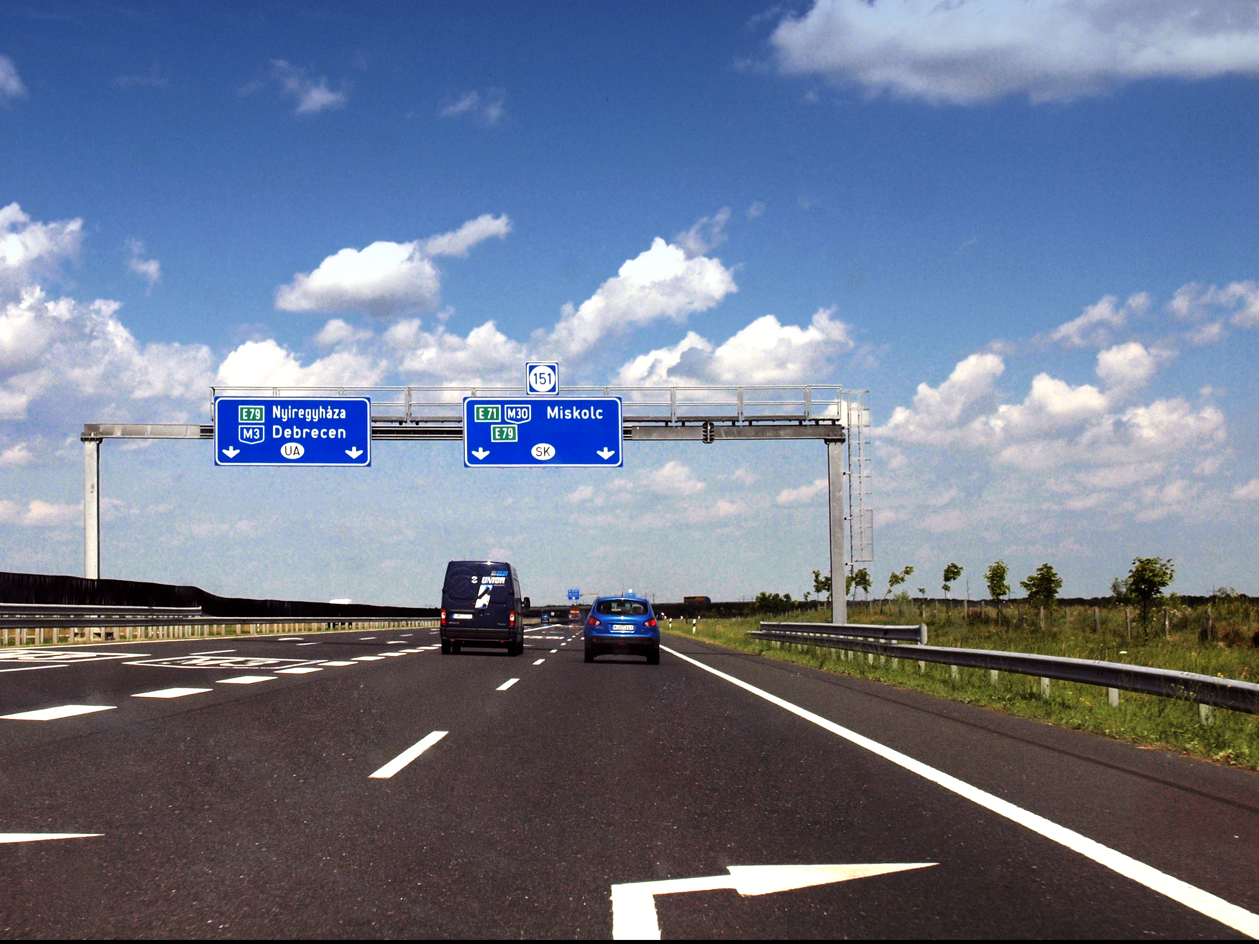 Autoroute M30 (route européenne E71) à l'approche de Miskolc (Hongrie)